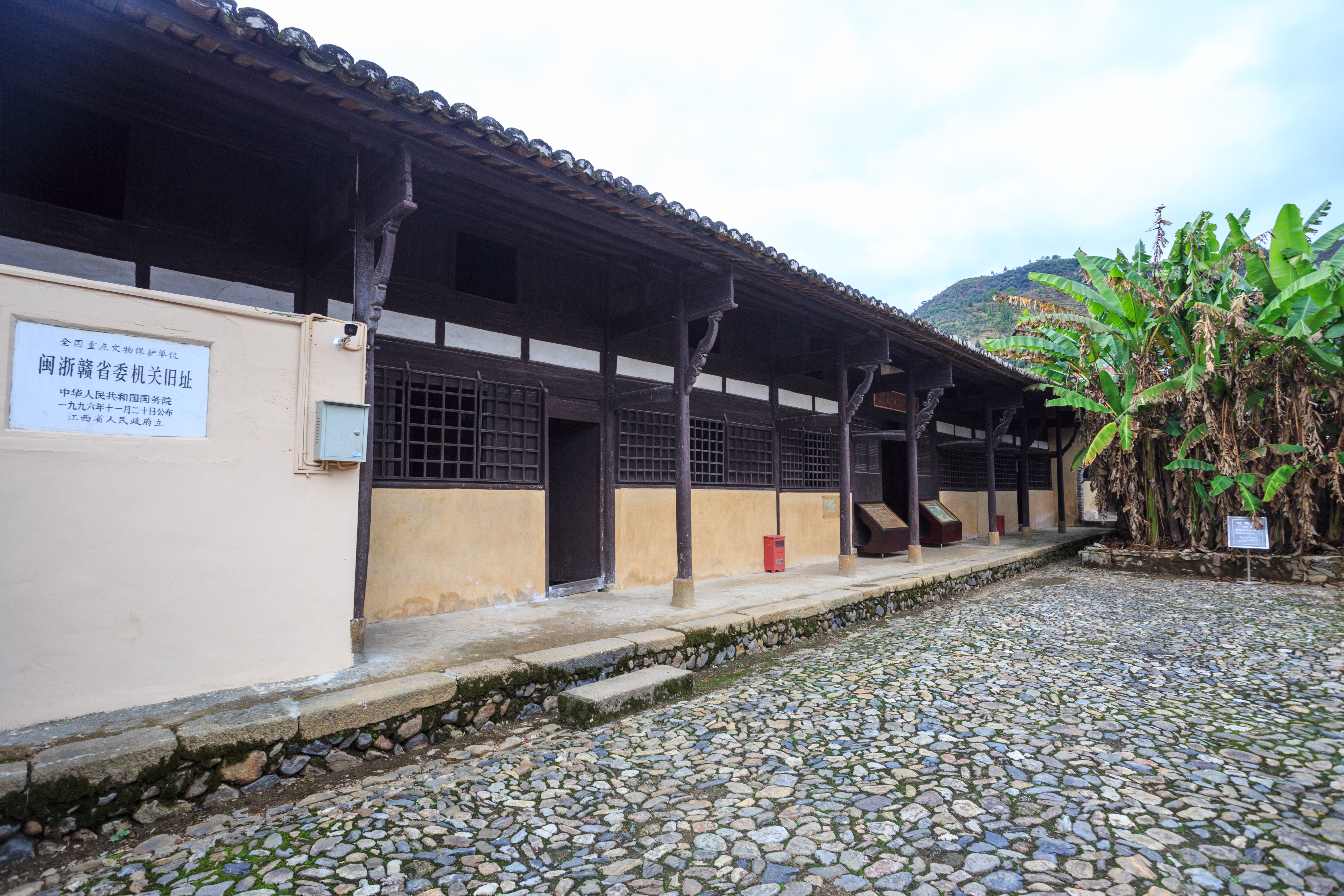 闽浙赣革命根据地旧址